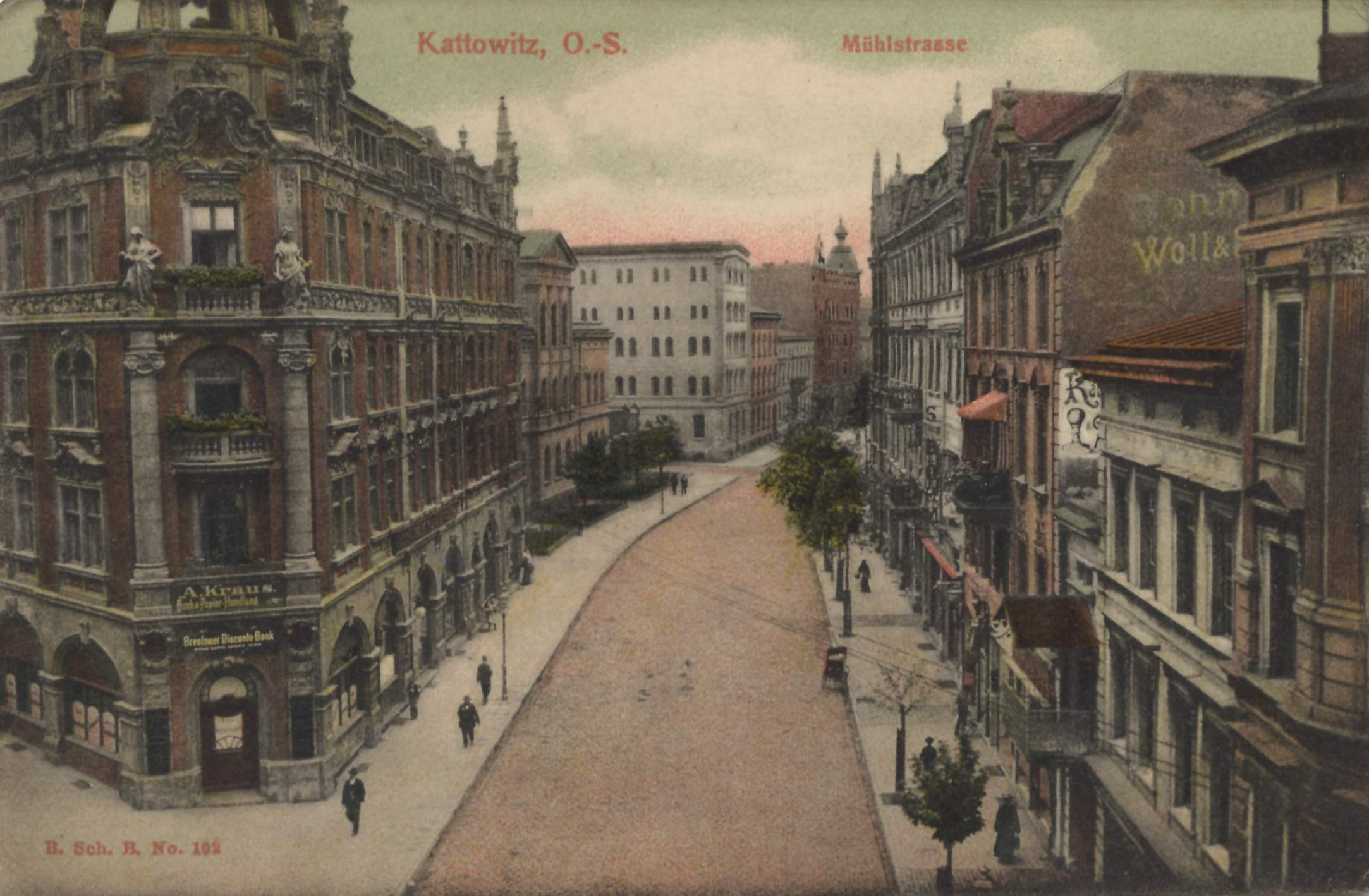 Katowice. Ul. Młyńska.